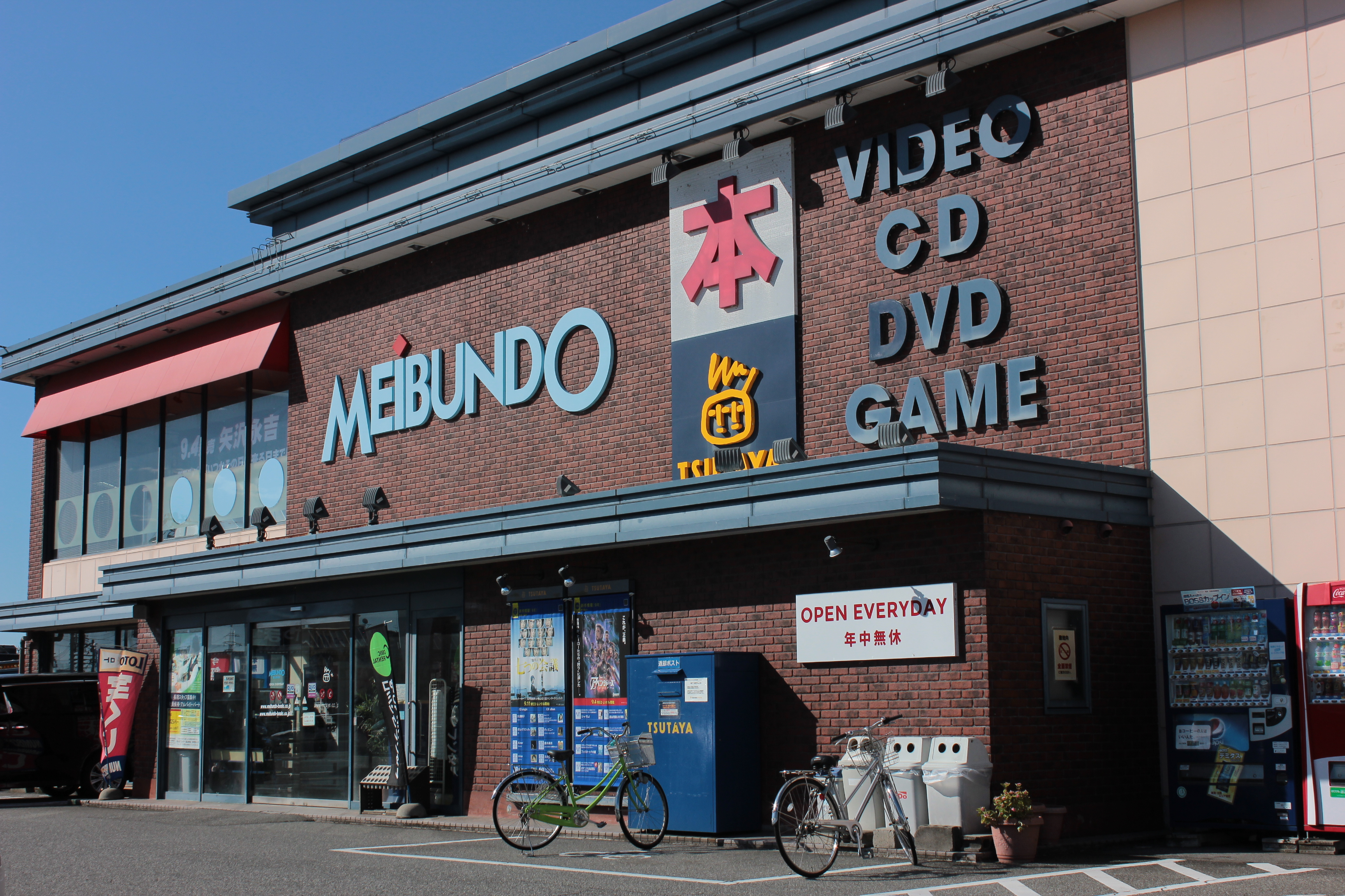 明文堂書店富山掛尾店（富山県富山市） Canon EOS Kiss X5